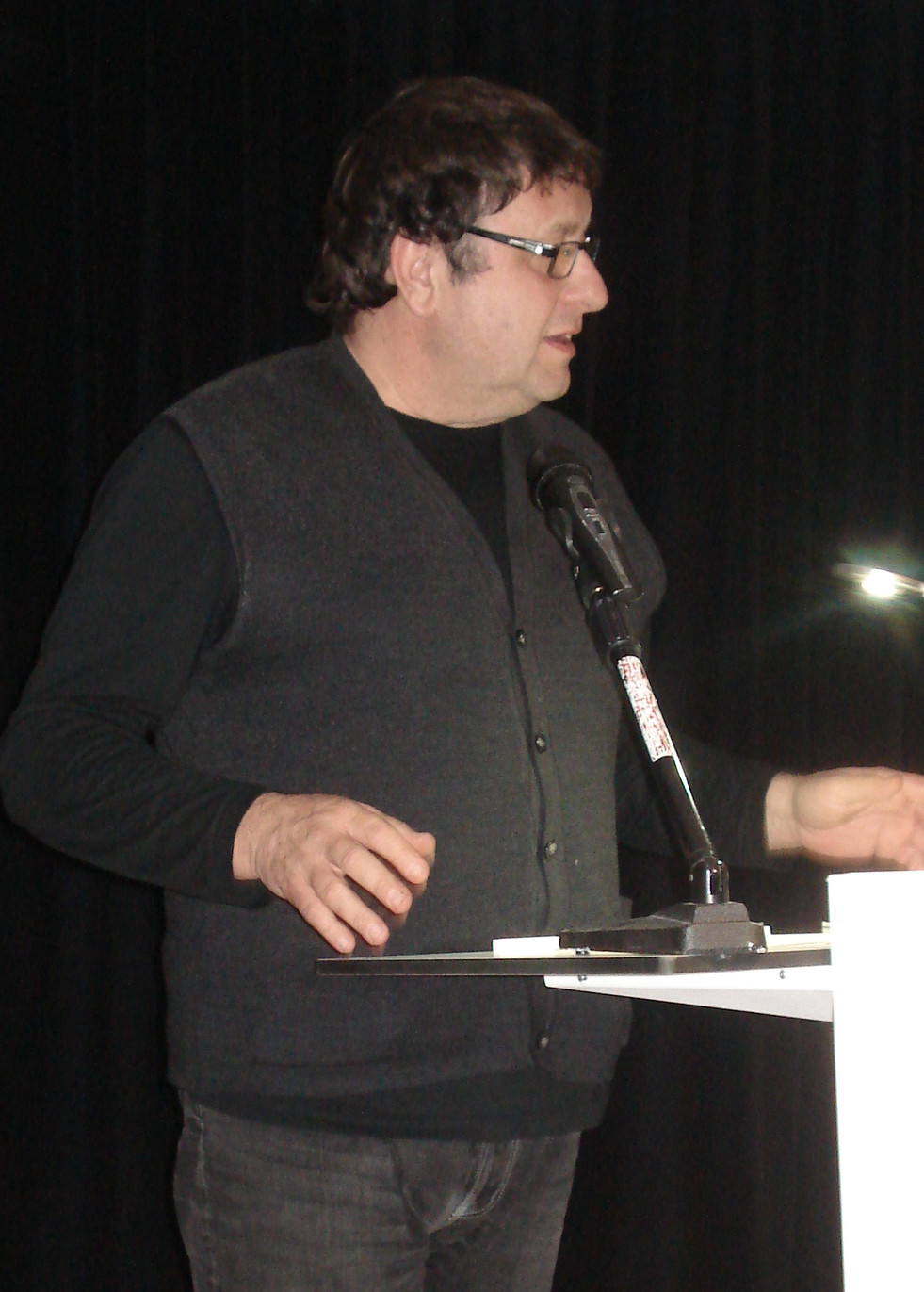 Jordi Virallonga recitant un poema de Javier Carnicer, durant l'homenatge celebrar a la Biblioteca Guinardó-Mercè Rodoreda el 10 de desembre de 2015